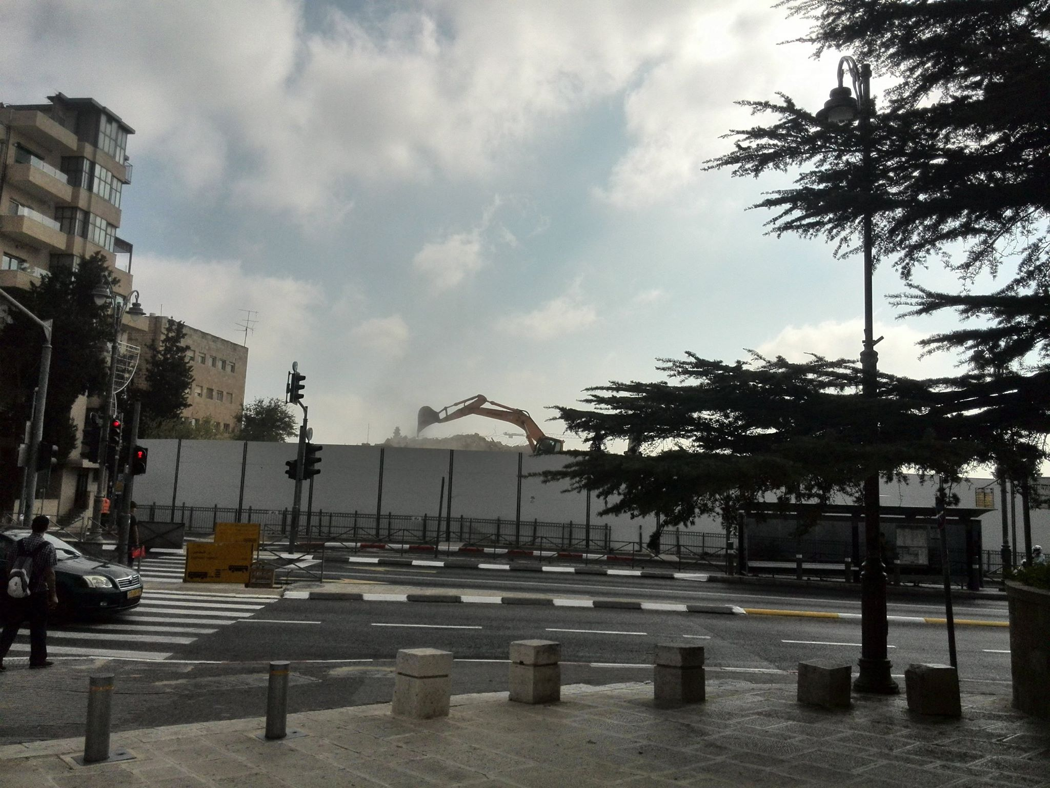 בית סולל בונה ירושלים בעת הריסתו